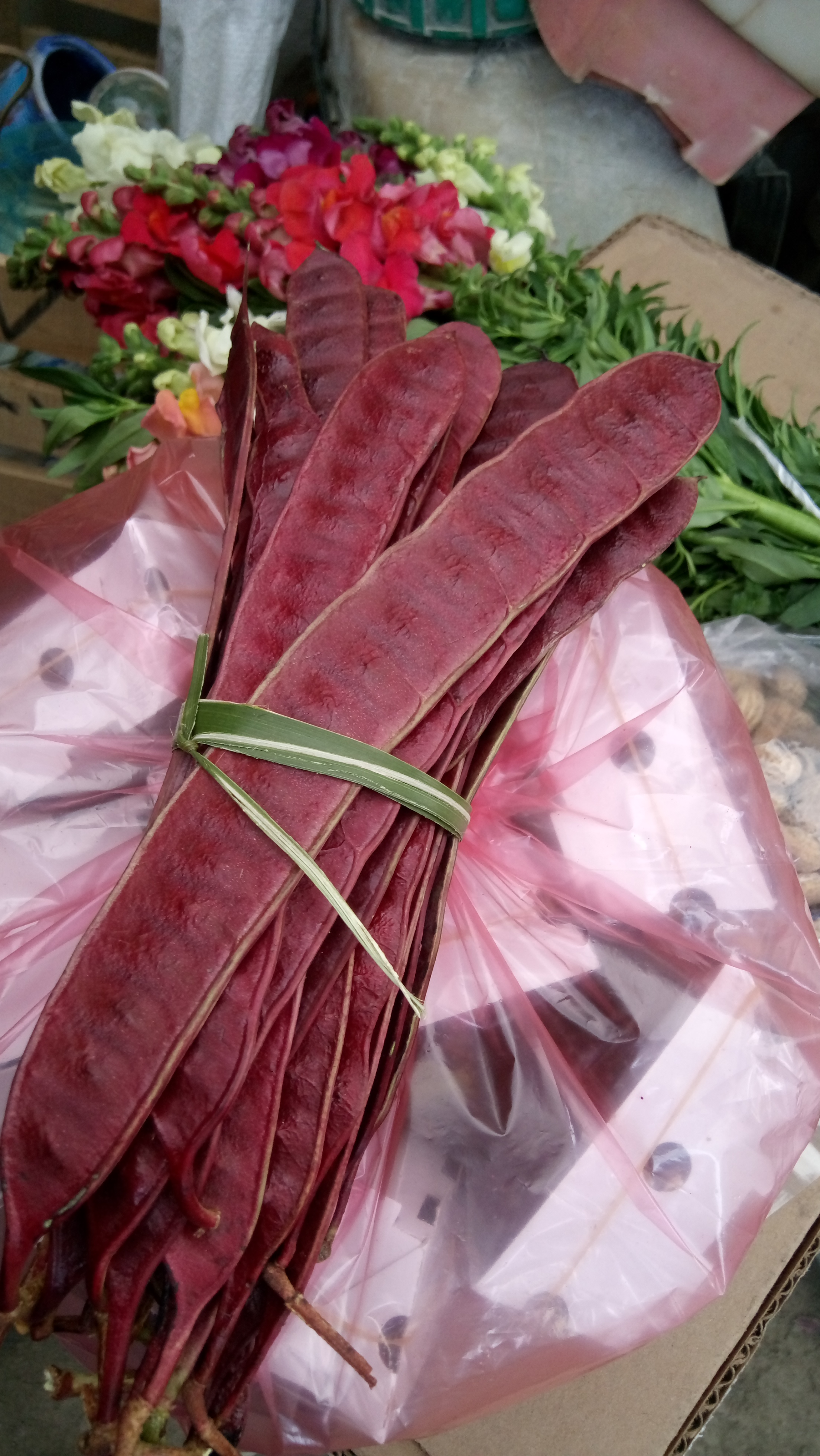 Cáscara tierna y larga en que están encerradas las semillas de algunas plantas.